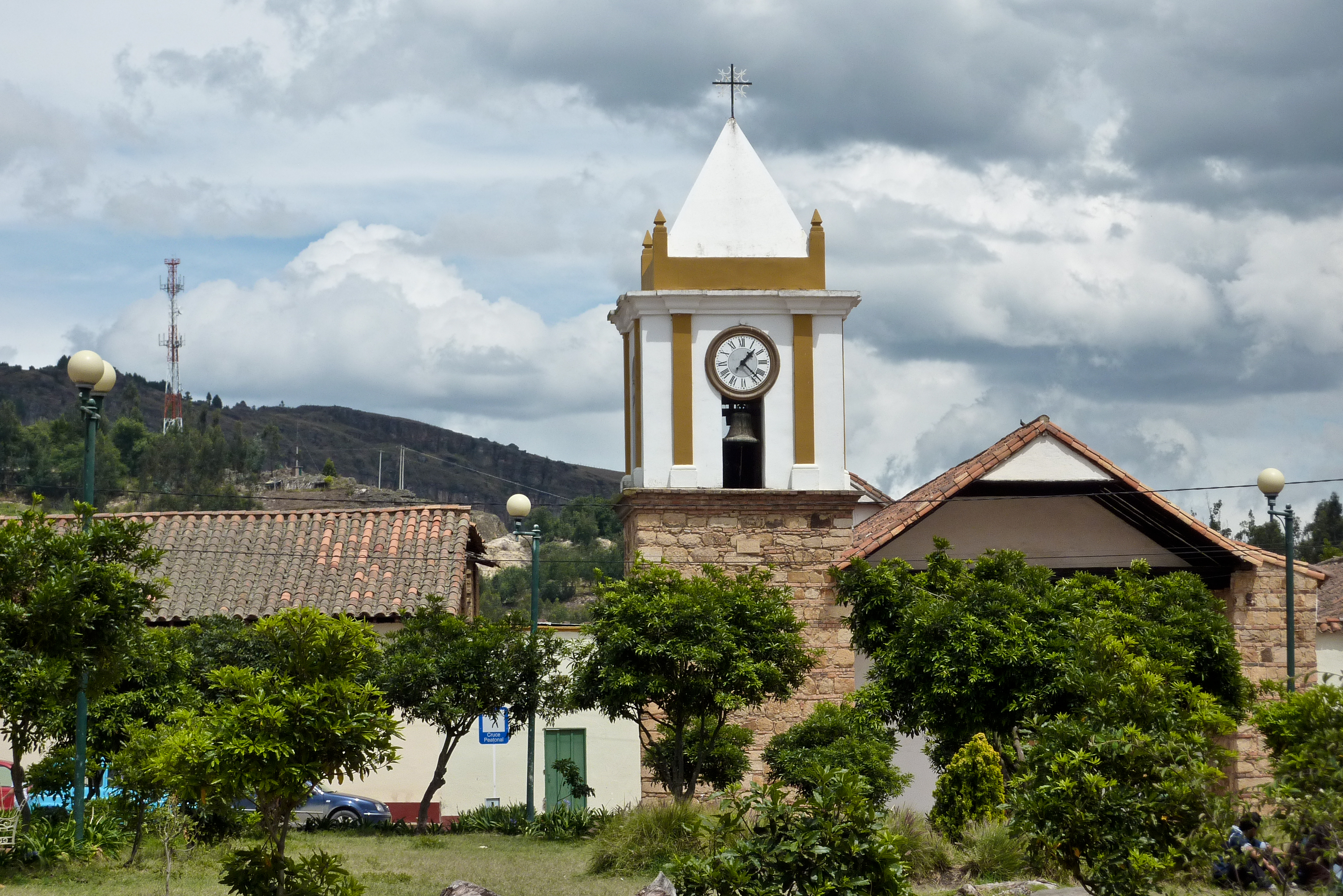 Capilla Doctrinera